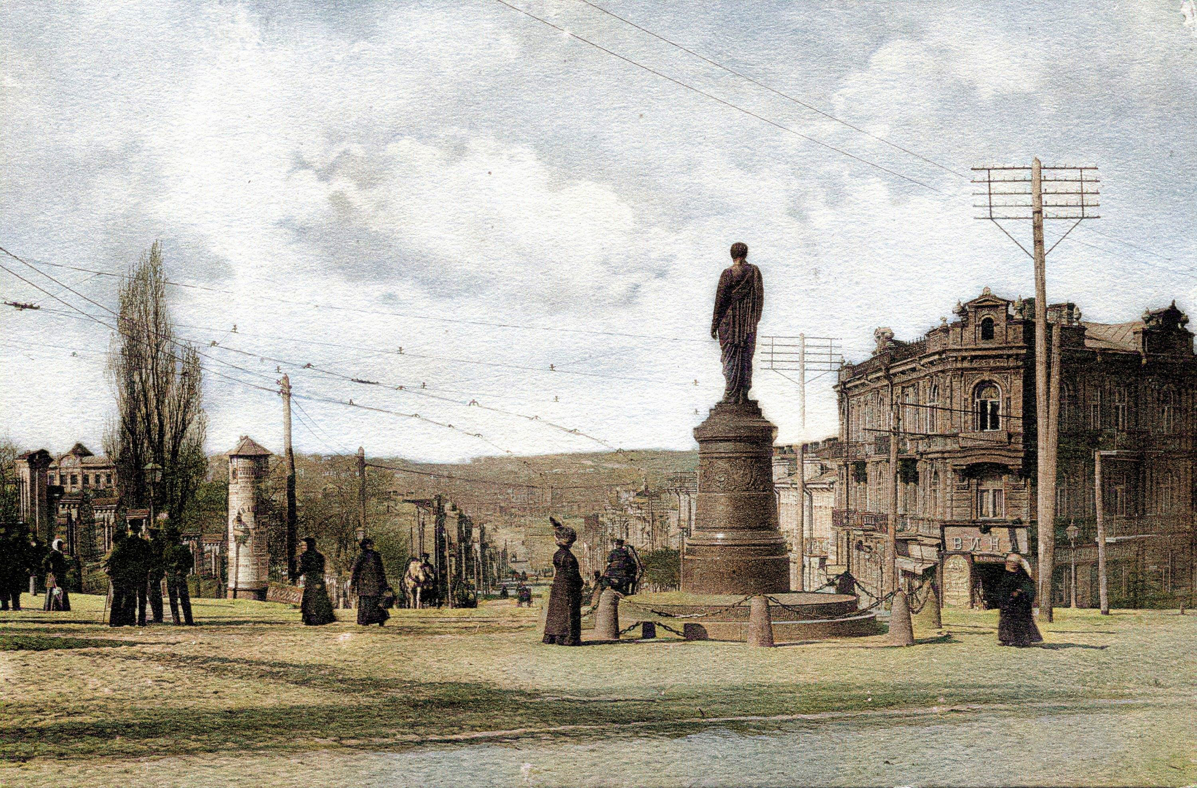 Будинок із левами (праворуч), Київ, Петлюри Симона вул., 2/4. Пам'ятник графу Бобринському